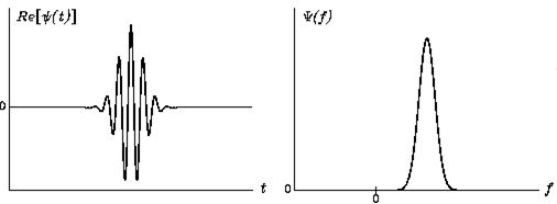 Временное и спектральное представления вейвлета Морле